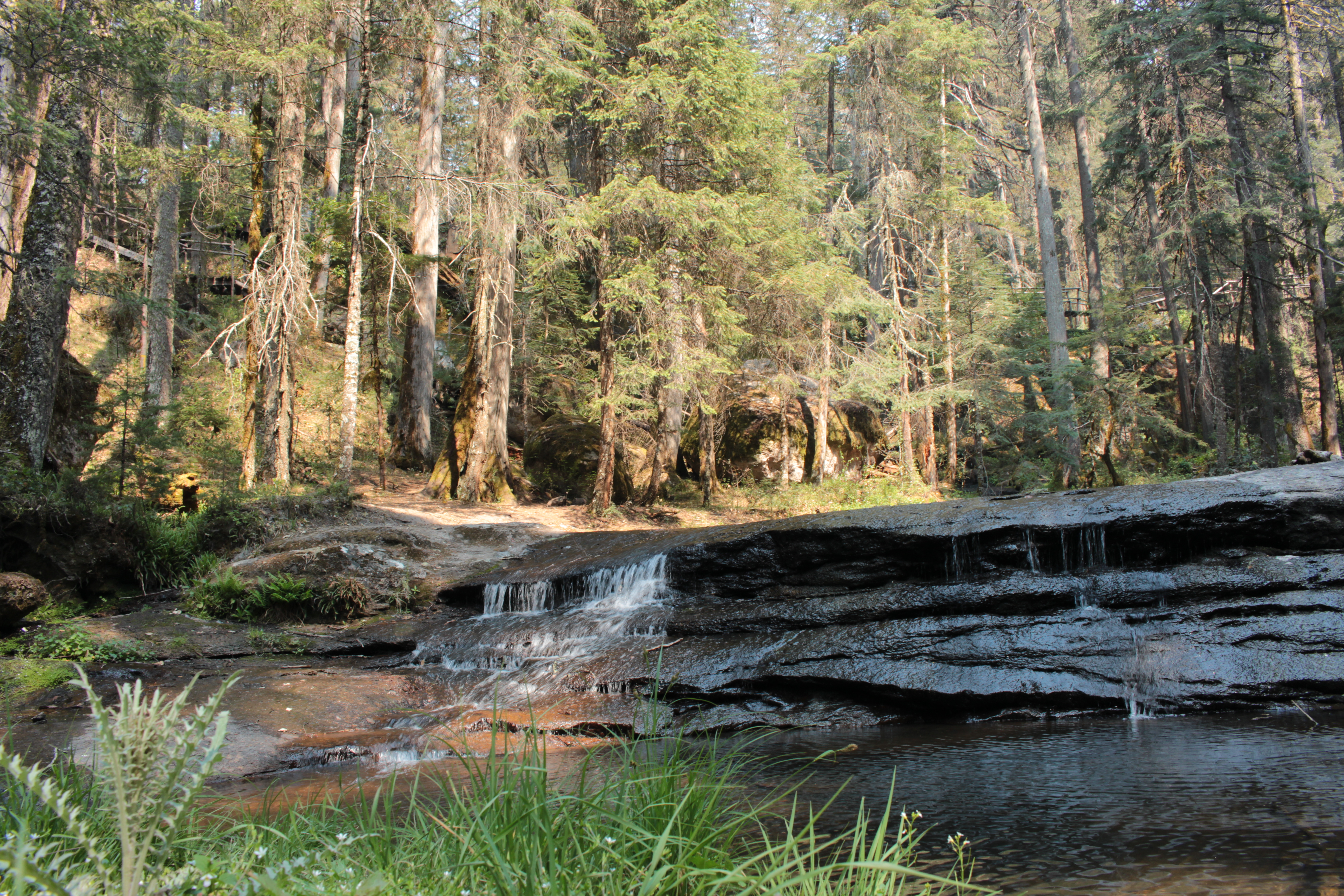 Caída de agua en la reserva natural "La quebrada de Santa Bárbara"